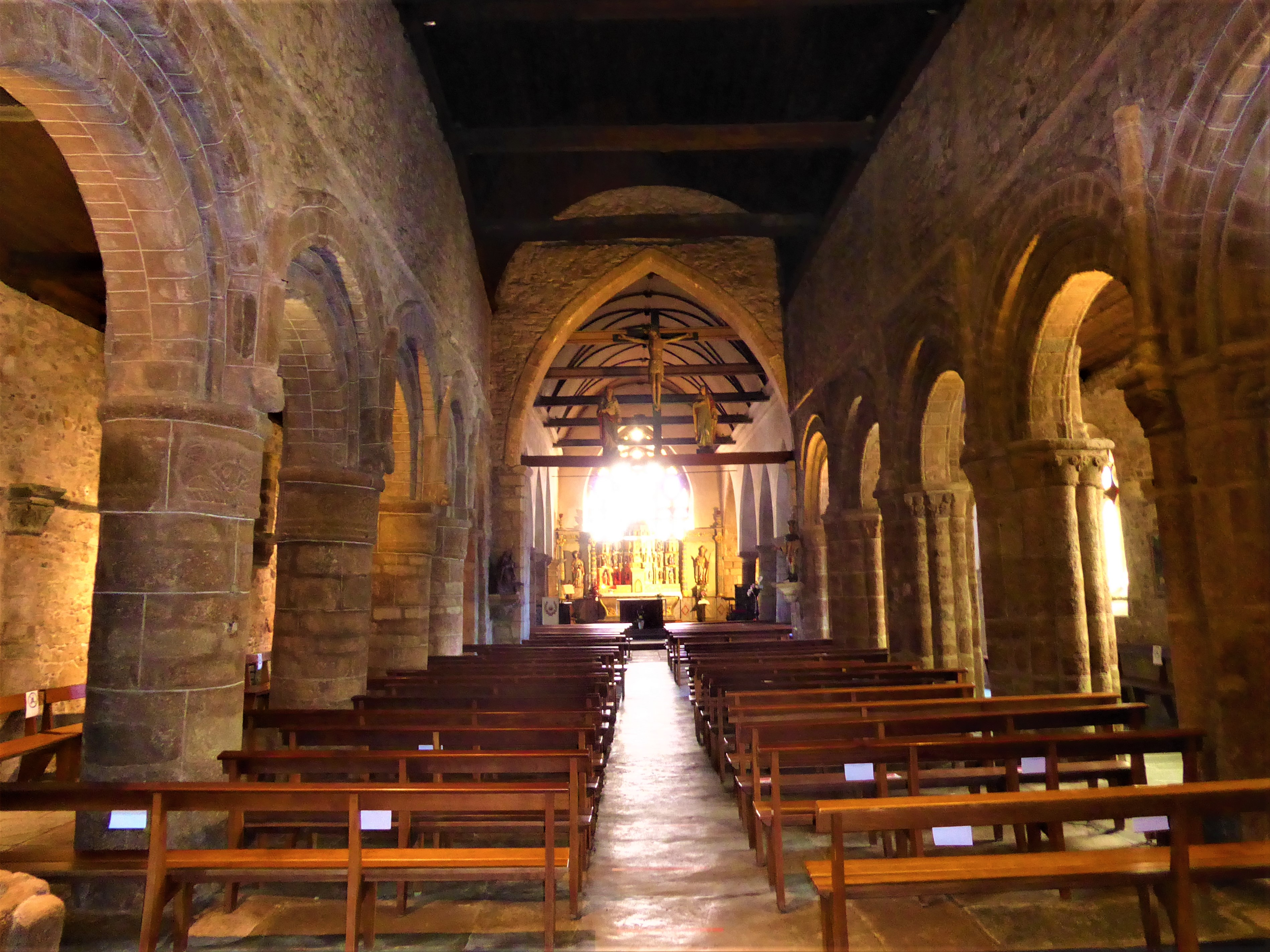 Église Saint-Jacques de Perros-Guirec